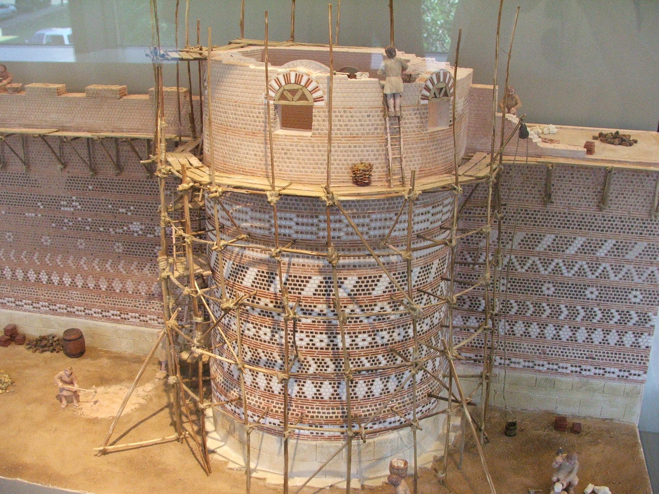 Maquette de la construction des Murailles Gallo-romaines du Mans (IIIè siècle APJC), visibles au Musée d'Archéologie du Maine, au Mans.